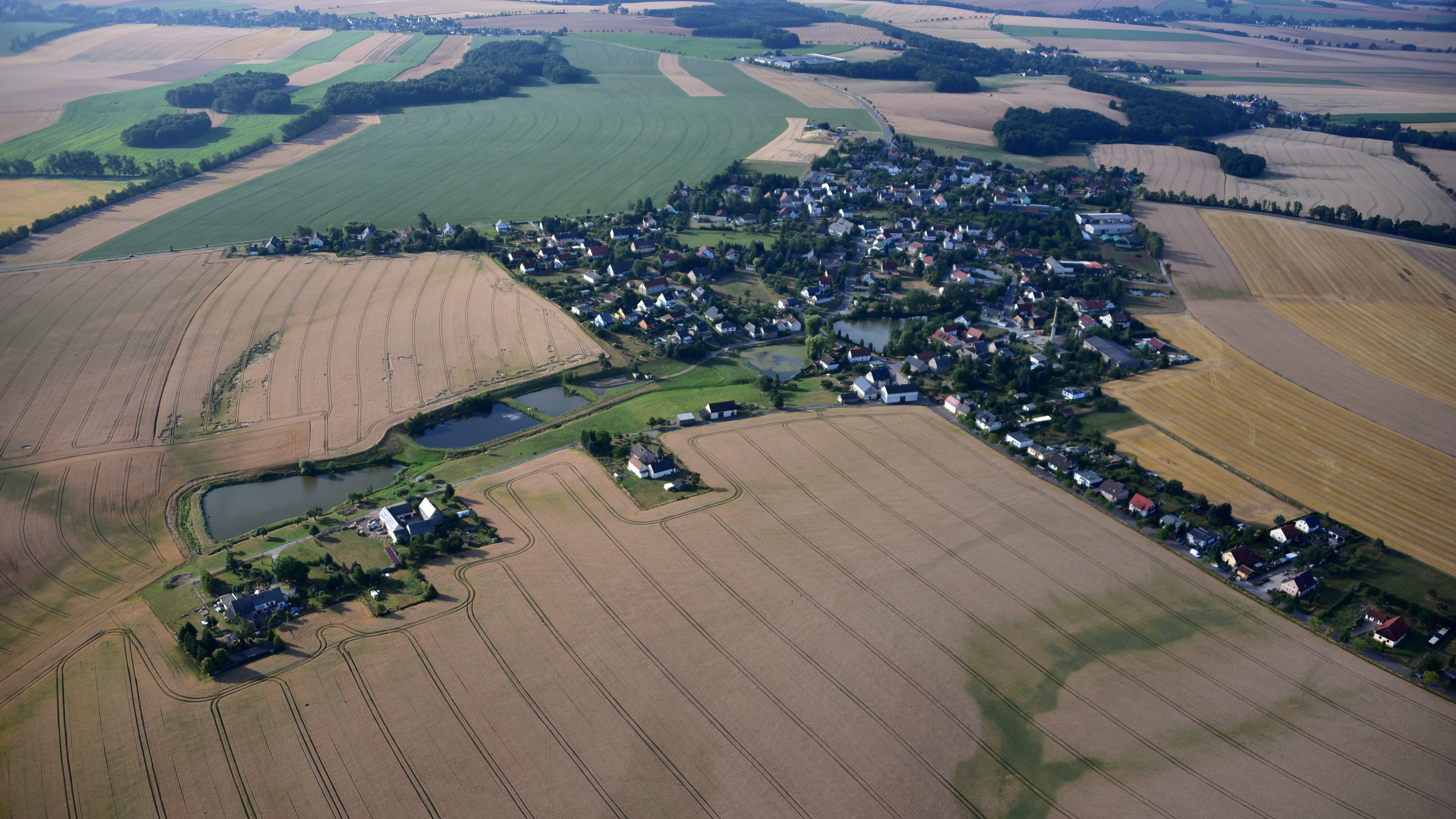 Mannichswalde, Luftaufnahme (2018)